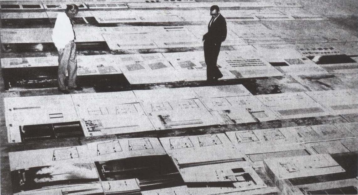 El jurado de arquitectos recorre y observa las propuestas presentadas al Concurso Internacional para el Edificio Peugeot a construirse en Buenos Aires, Argentina. Finalmente el proyecto no se construyó.